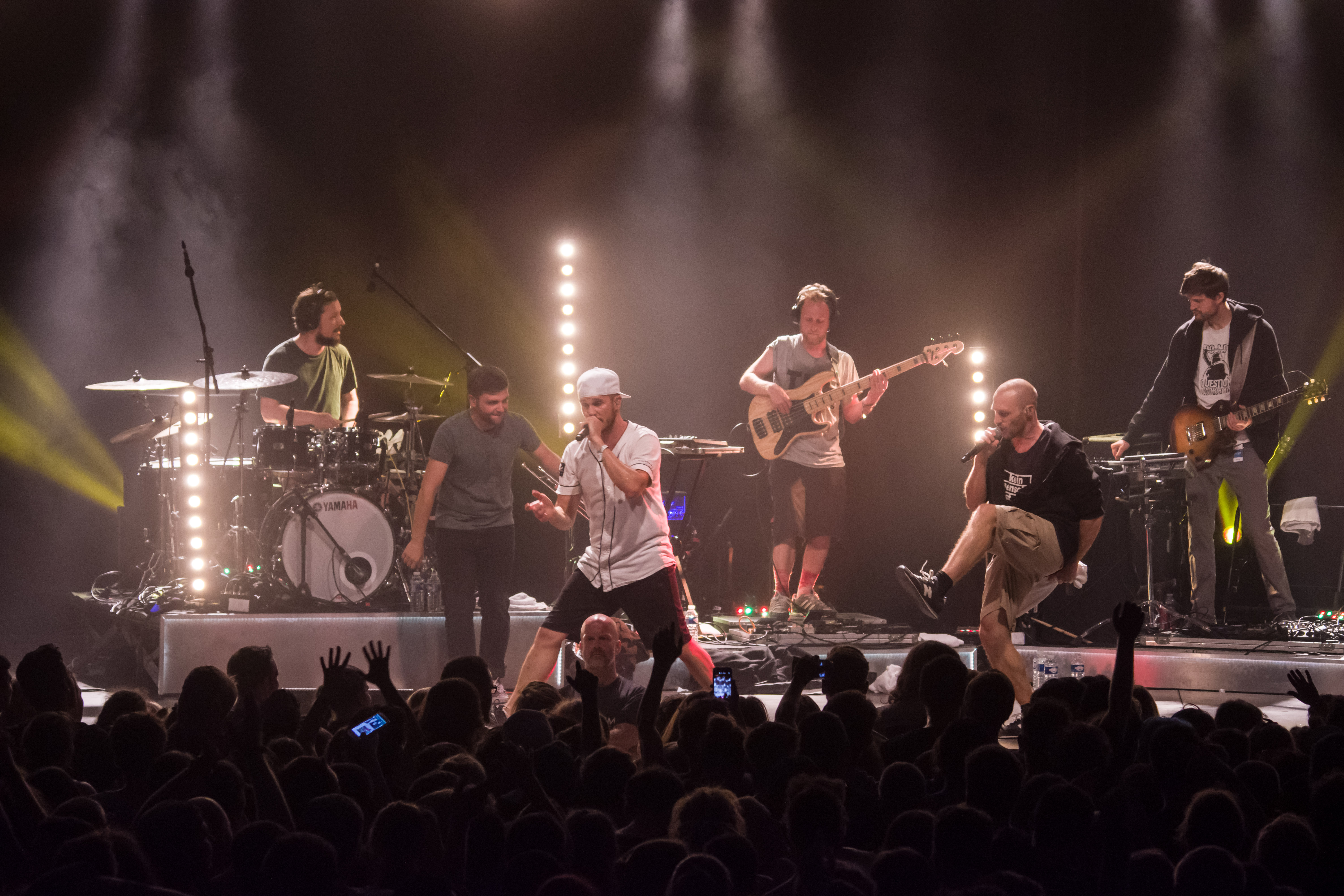 Das Zelt-Musik-Festival 2017 in Freiburg im Breisgau 15.07.2017 Irie Révolté